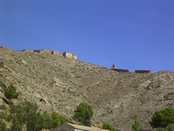 Fotografía del Castillo de Orihuela